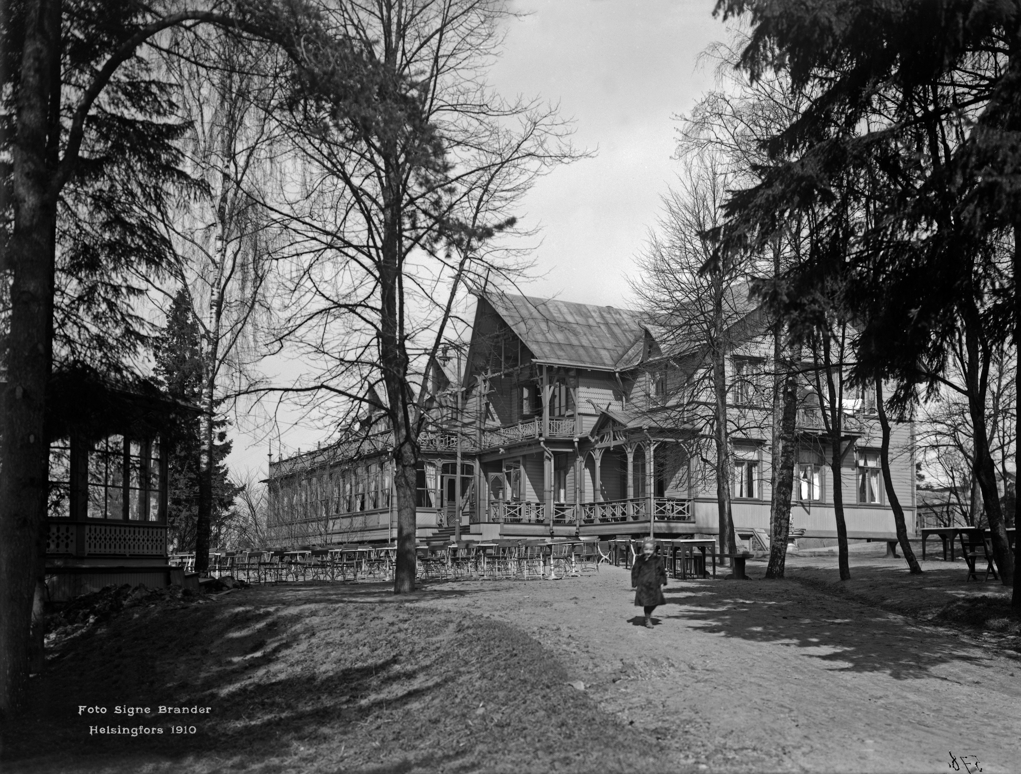 Ravintola Alppila.; negatiivi ja vedos, lasi paperi pahvi, mv